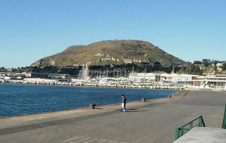 Campi Flegrei, massiccio tufaceo del Monte Gauro (visto dal porto di Pozzuoli). Davanti ad esso si nota molto bene, lungo la linea di costa, l'altipiano della Starza.